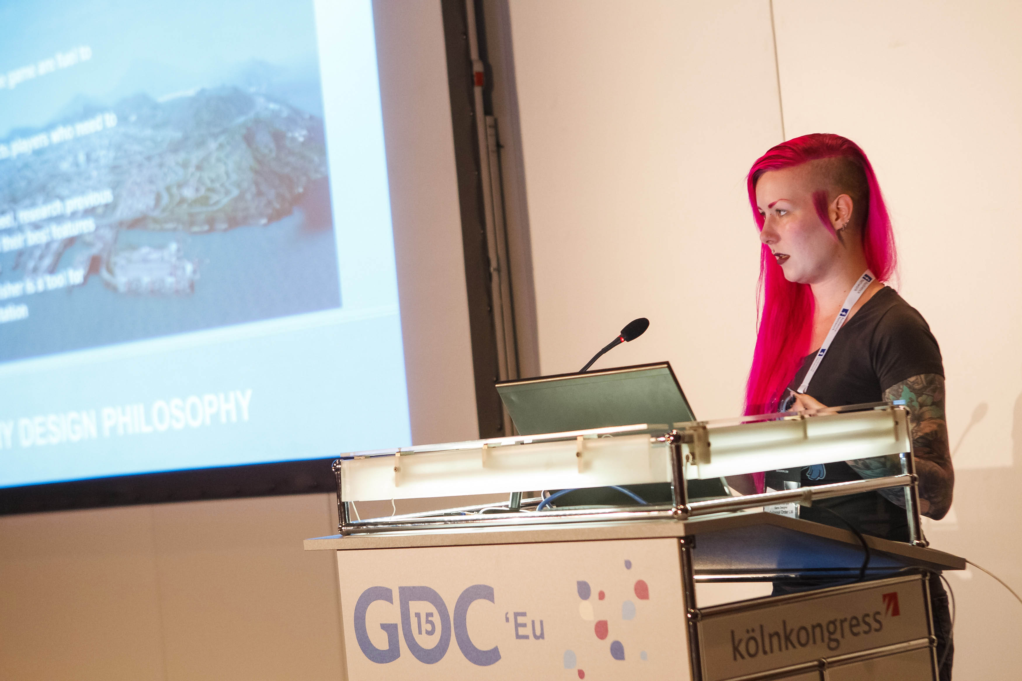 Speakers: Karoliina Korppoo (Game Designer, Colossal Order Ltd)